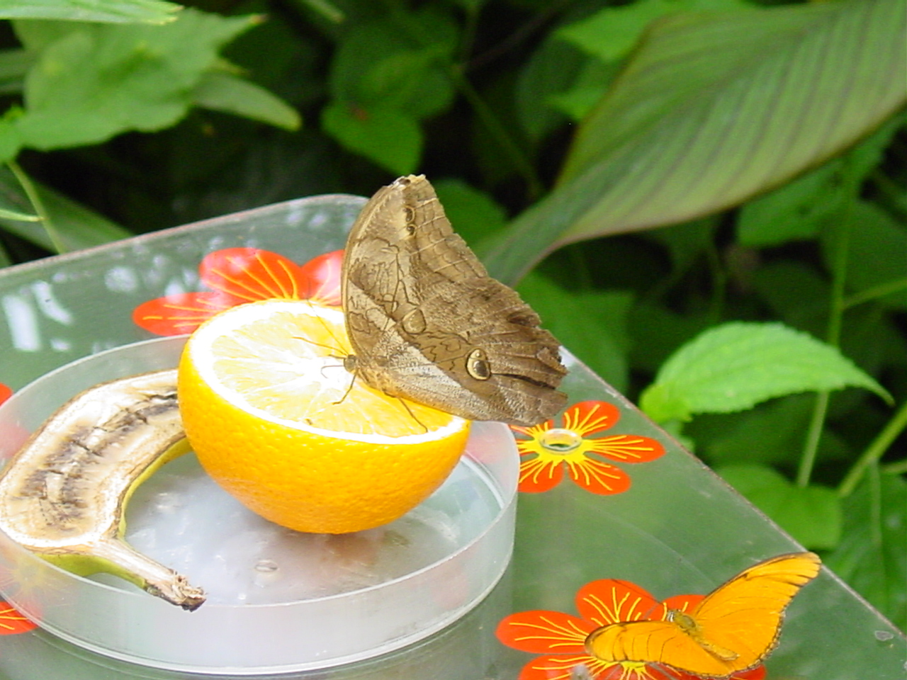 Butterflies feeding in Emmen Zoo, the Netherlands.Het voederen van de vlinders in de vlindertuin van Dierenpark Emmen, Nederland.